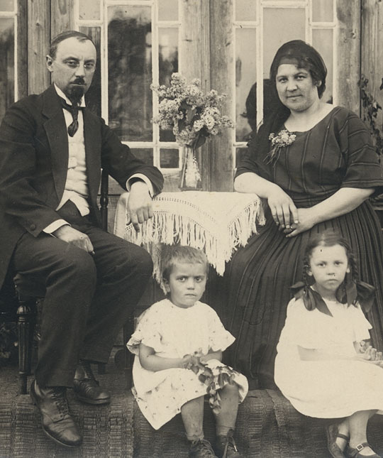 Mart ja Eliise Saar 1922. aasta juunis Hüpassaares. Ees istuvad õetütar Helmi Tomson ja tütar Heli